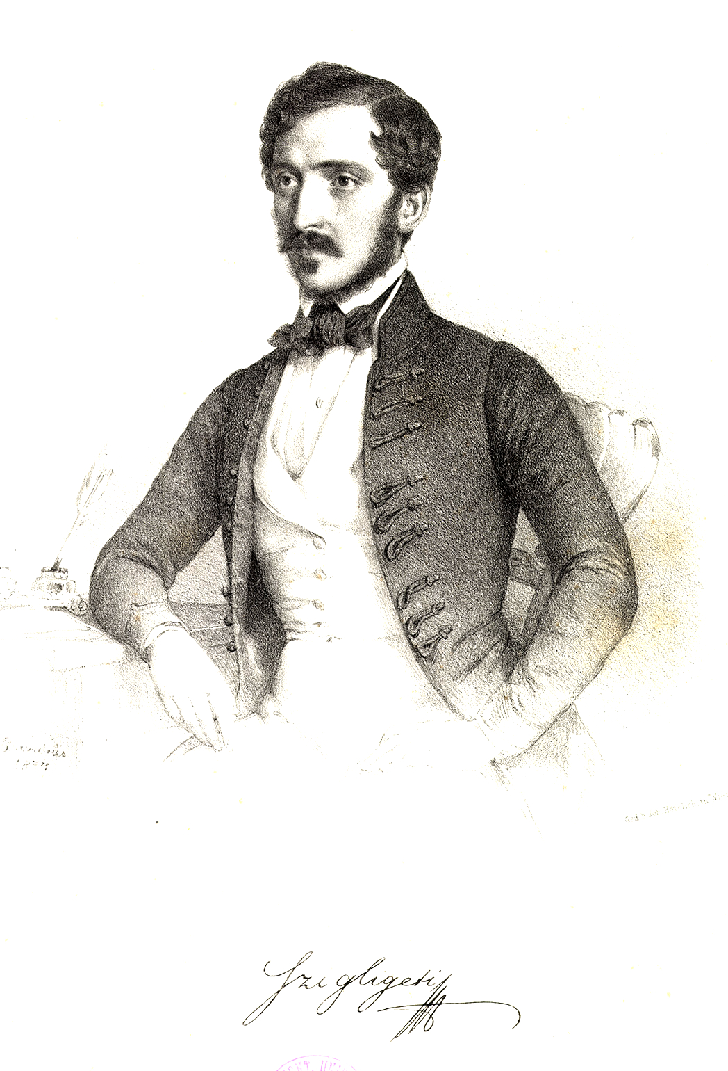 Szigligeti Ede (1814-1878) drámaíró, rendező litográfia portré 19. sz.